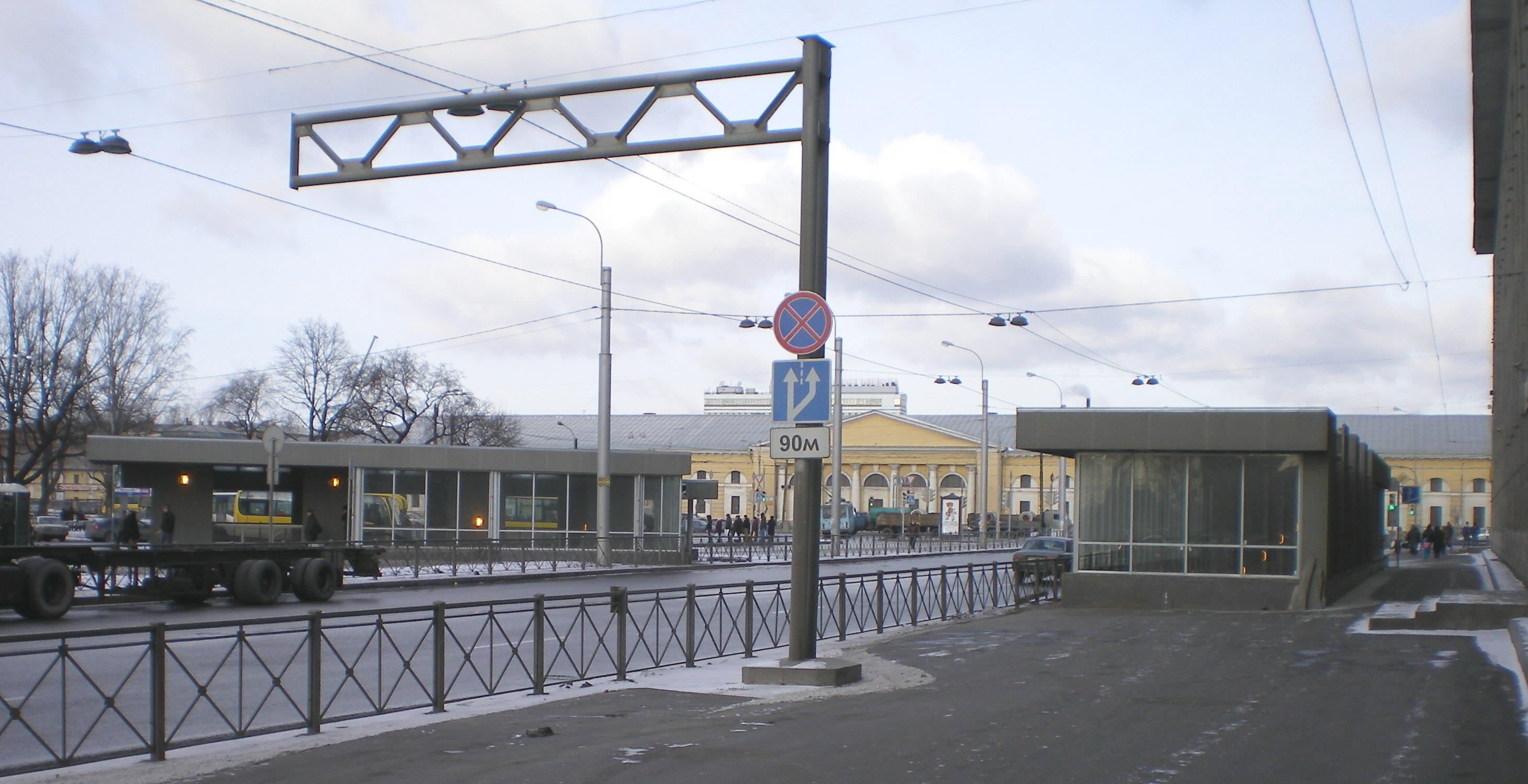 Подземный пешеходный переход на площади Балтийского вокзала. Чётная сторона